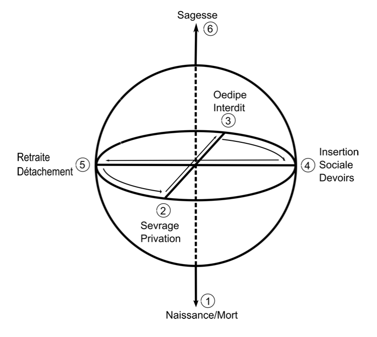 Figure 4. Application du modèle aux significations de Saturne.